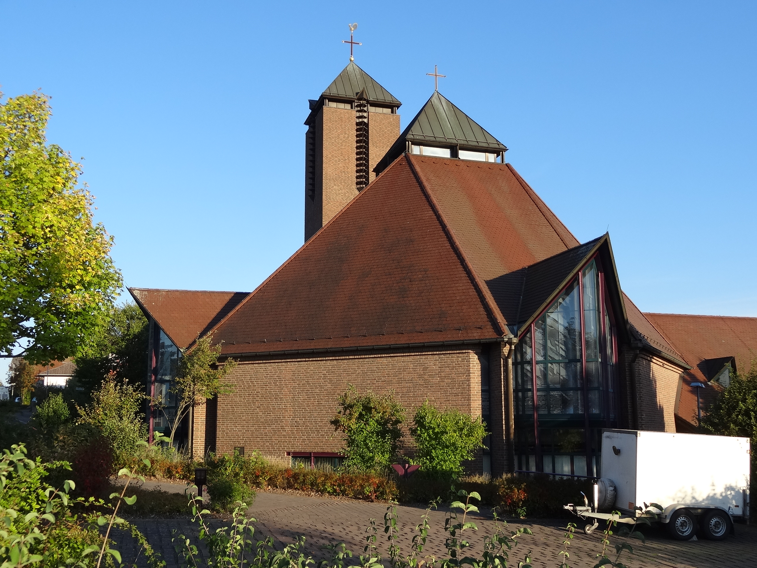 St. Martin (Watzenborn-Steinberg)